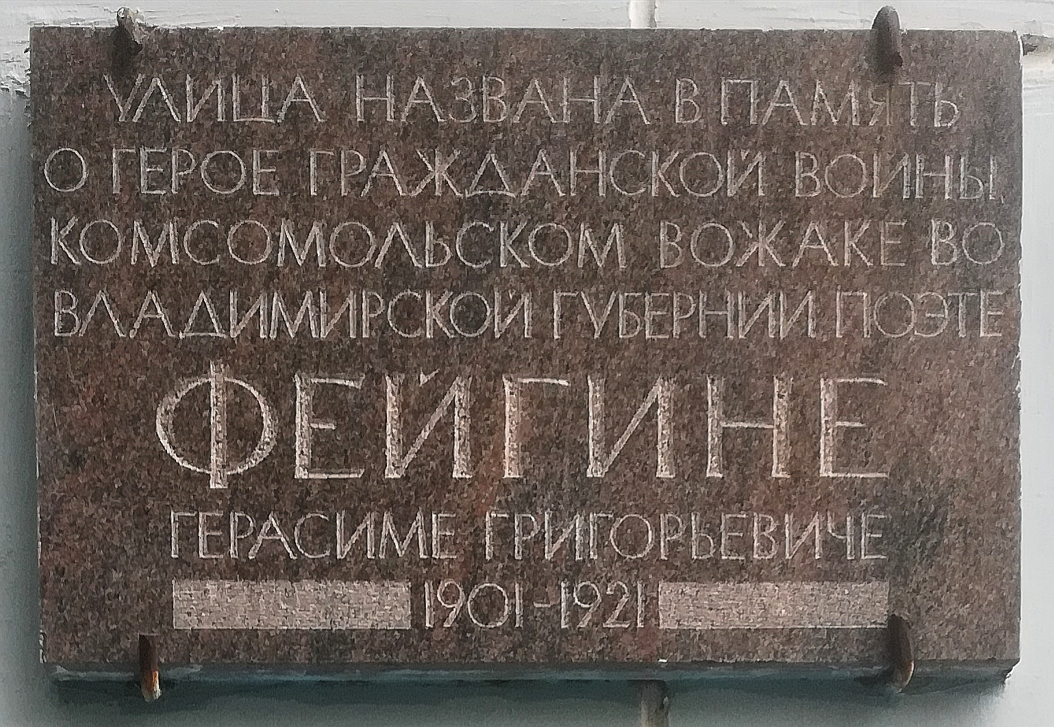 Владимир